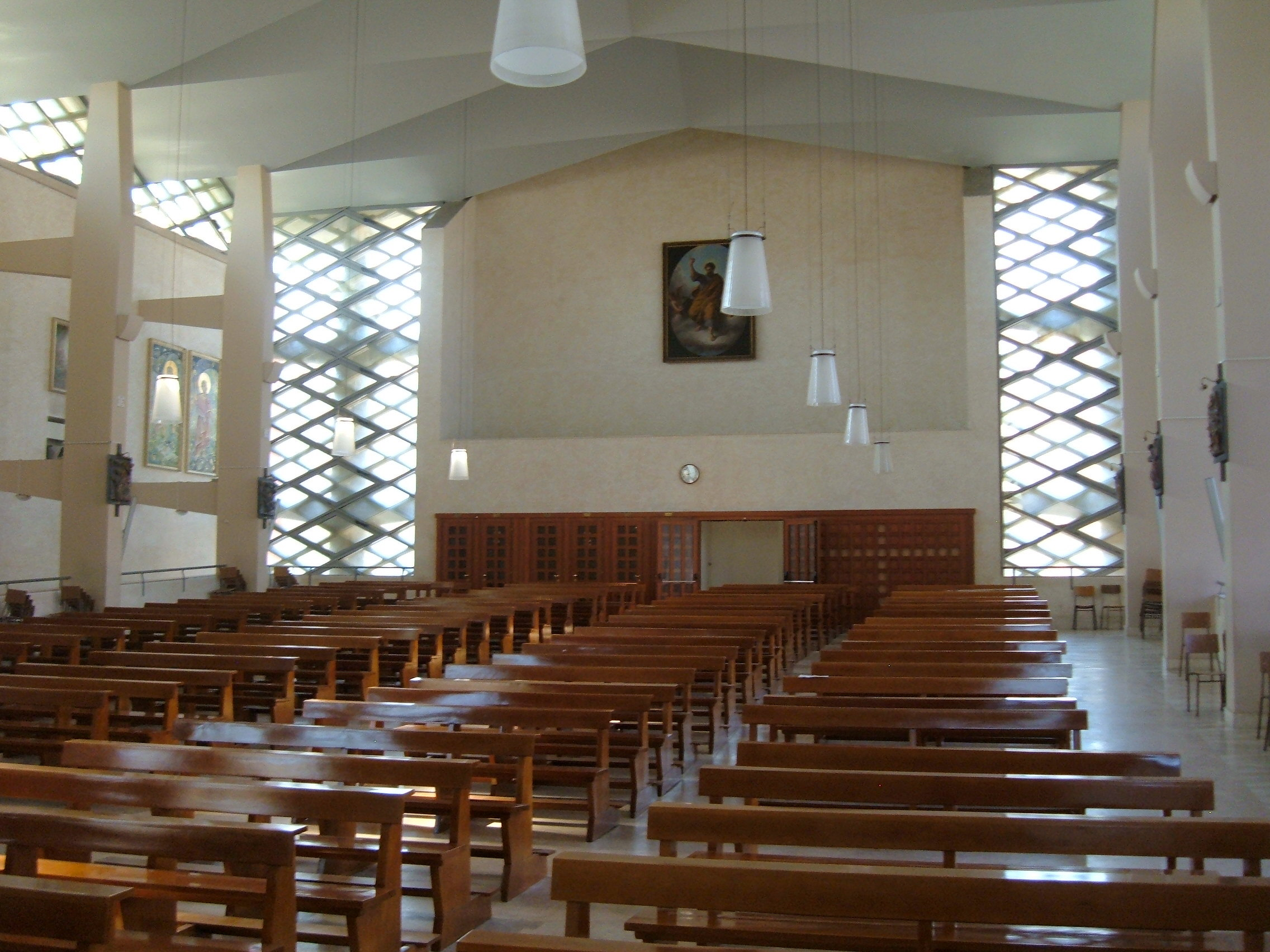 Chiesa di San Luca evangelista, a Roma, nel quartiere Prenestino-Labicano. Interno (verso il fondo).